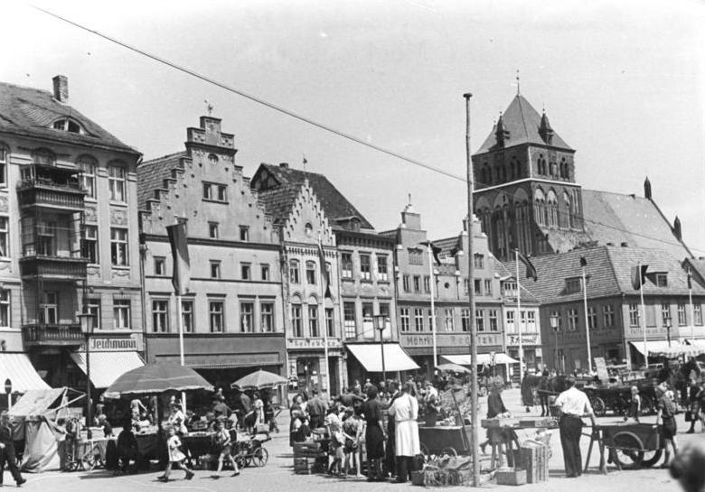 Greifswald, Marktplatz mit Markt Zentralbild Heilig 18.6.51 Der Marktplatz von Greifswald.